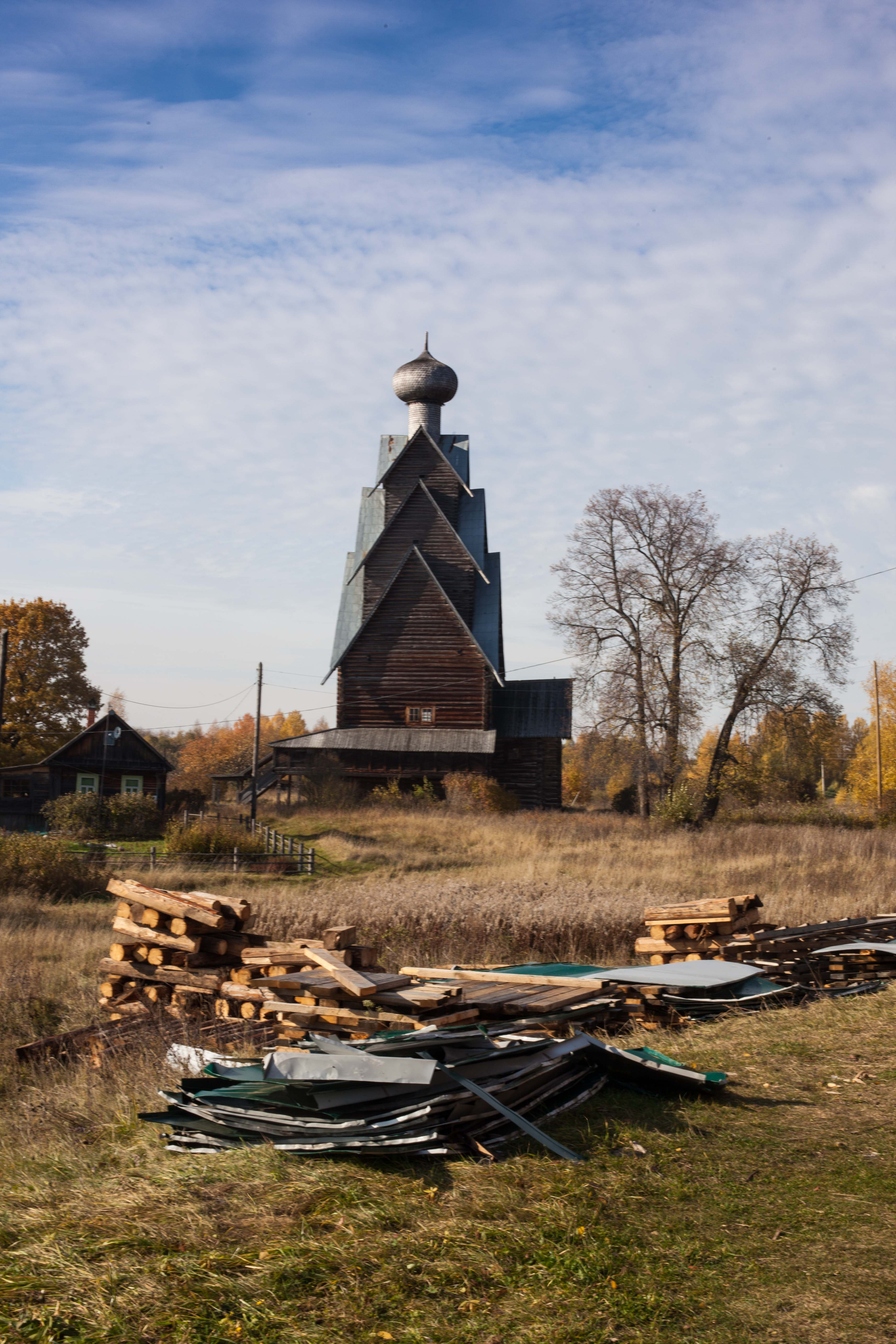 Церковь Иоанна Предтечи (деревянная) (Тверская область, Осташков, деревня Ширково (Ширков Погост))